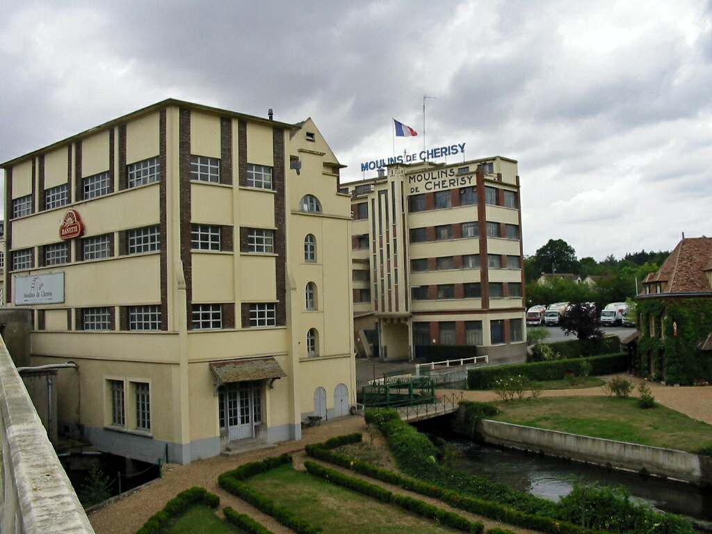 Moulins de Chérisy (Eure-et-Loir) Photo JH Mora, août 2005